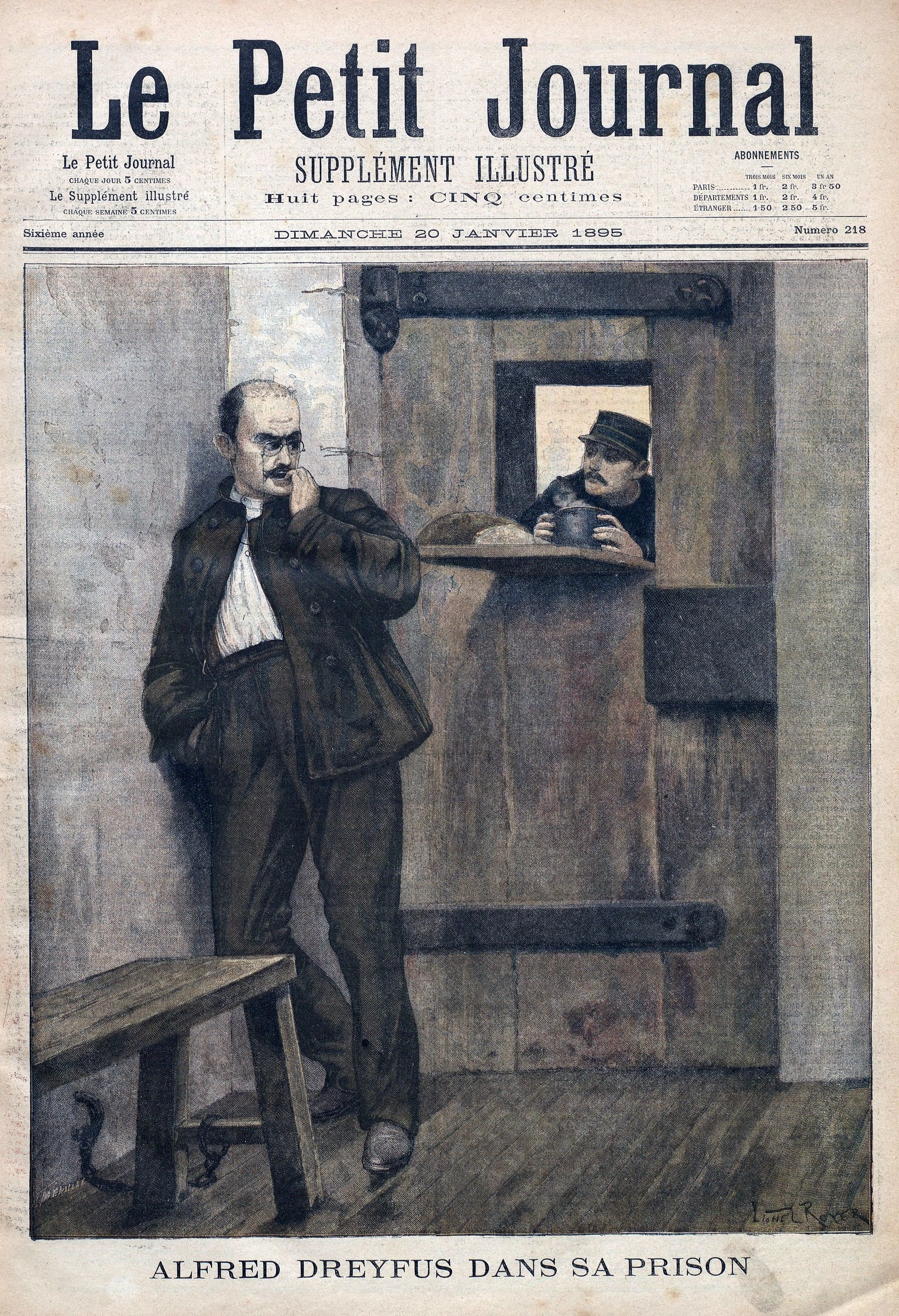 Image du Petit Journal - Affaire Dreyfus. « Alfred Dreyfus dans sa prison »